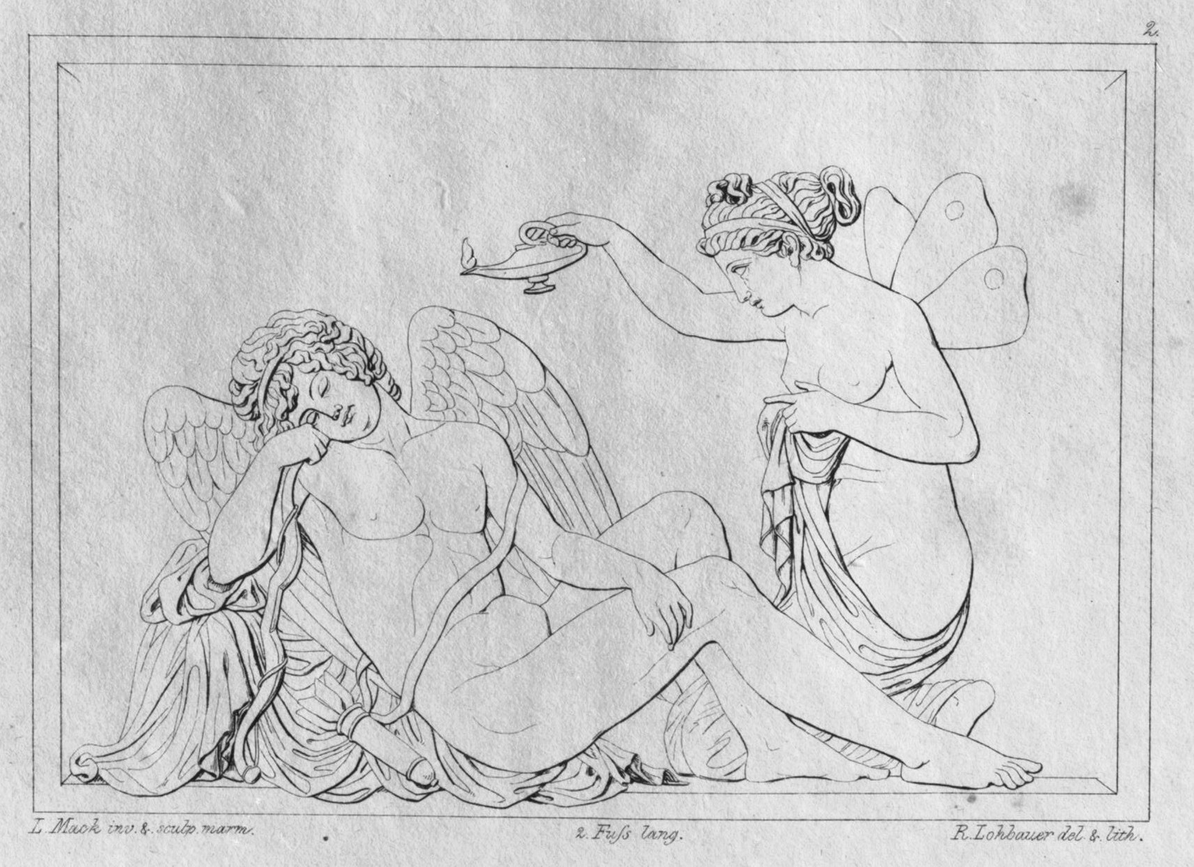 Ludwig Mack / Lithograph: Rudolph Lohbauer: Amor und Psyche (1824/1825), Flachrelief in Marmor, 34 x 60 cm, Stuttgart, Staatsgalerie Stuttgart, Inventarnummer P 573.